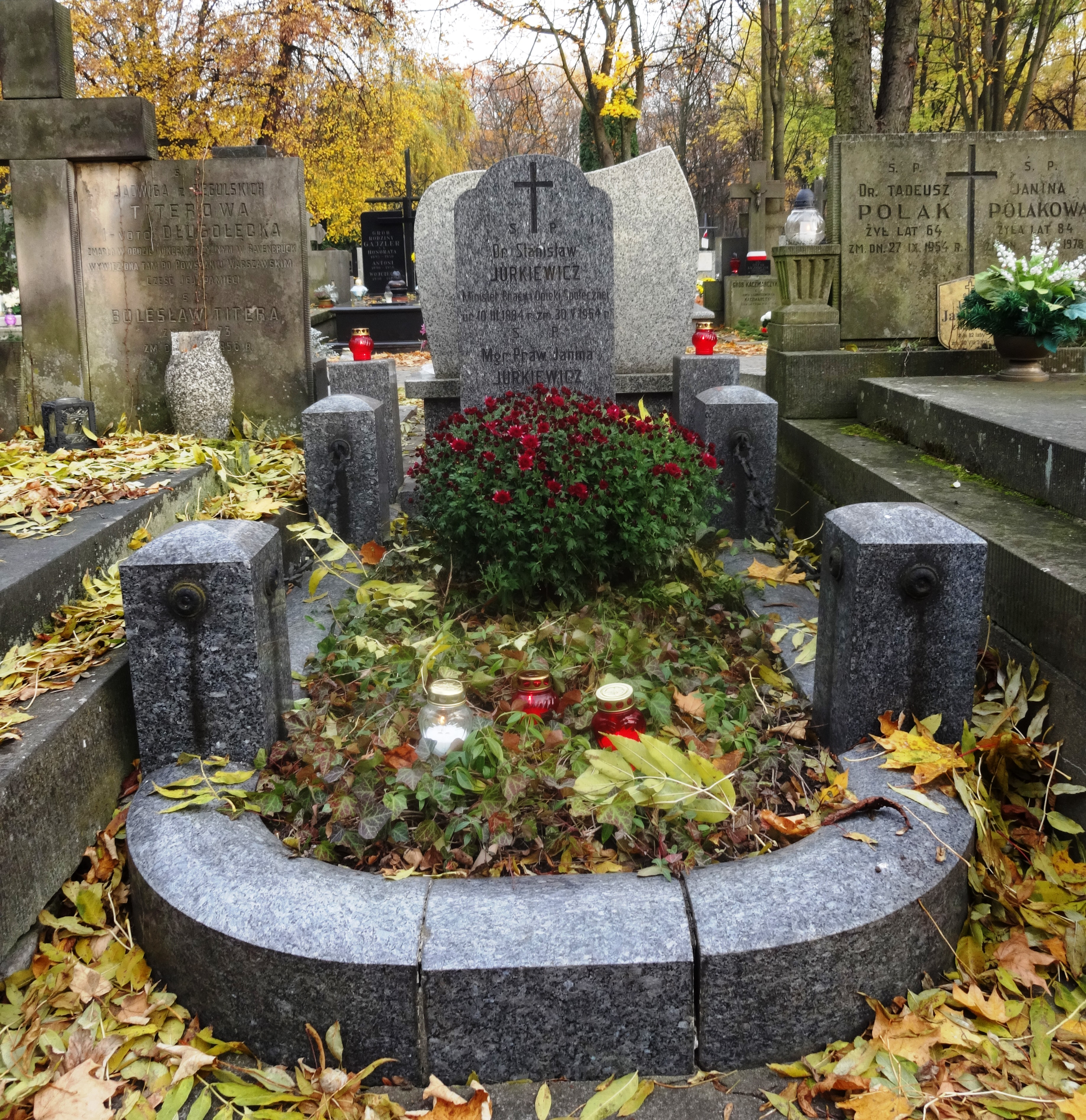 Grób Stanisława i Janiny Jurkiewiczów na warszawskich Powązkach (kwatera 133-II-17)